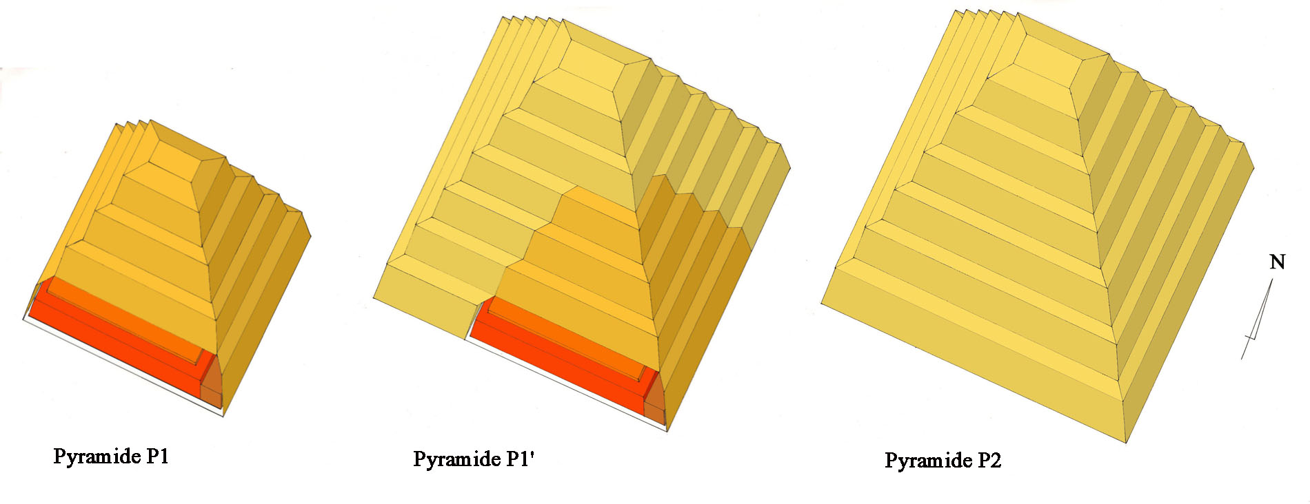 Evolution de la pyramide à degrés de Djoser à Saqqarah